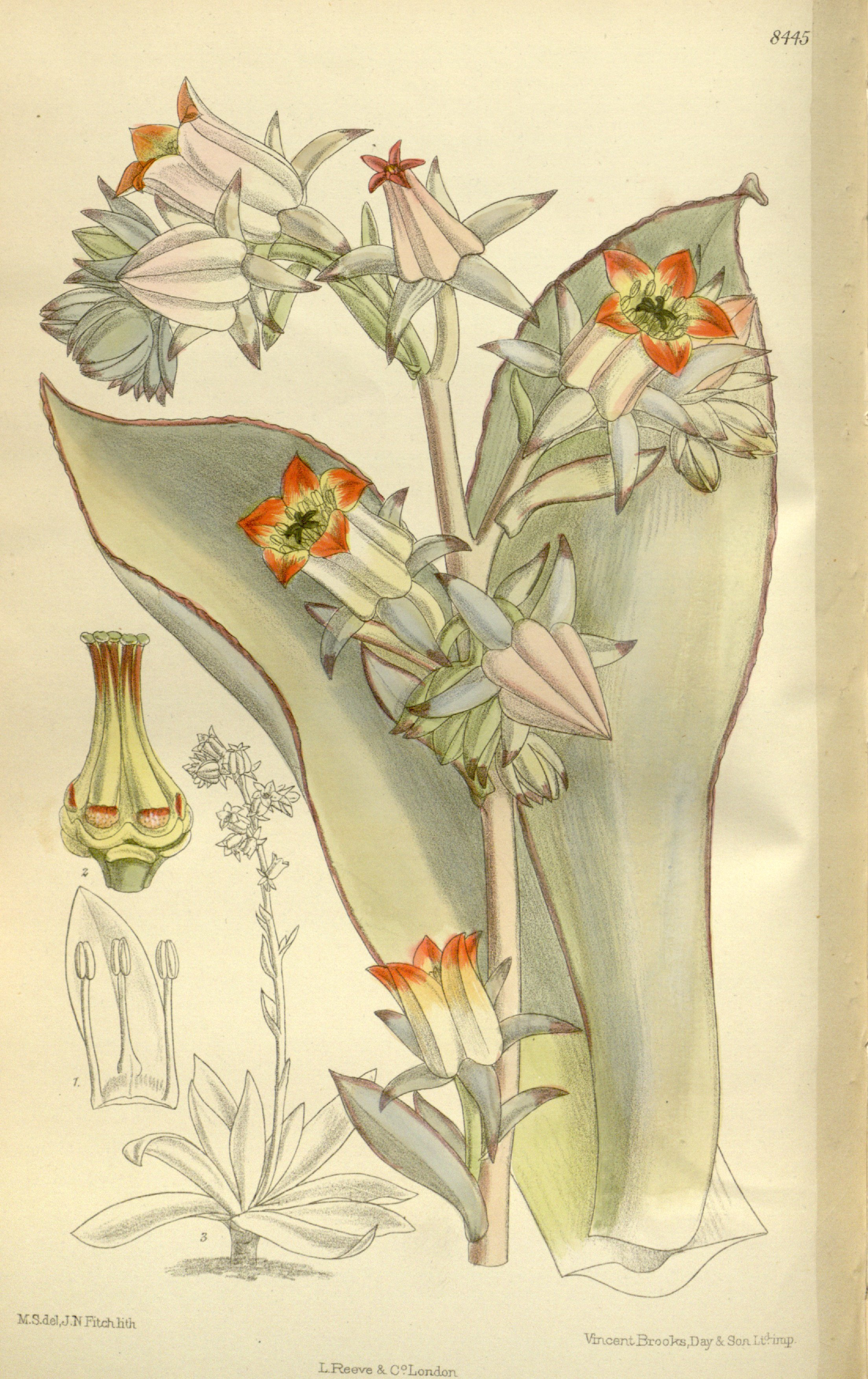 Cotyledon subrigida (= Echeveria subrigida), Crassulaceae